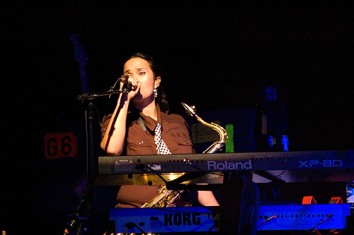 Scheila Gonzalez performing during a Zappa Plays Zappa concert